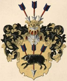 Kurselli suguvõsa aadlivapp